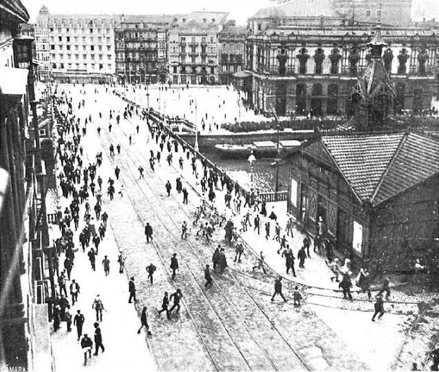 Carga de efectivos militares contra los huelguistas en el puente del Arenal –entonces puente de Isabel II– en septiembre de 1911, durante las grandes huelgas que tuvieron lugar en Vizcaya en 1890-1911. Al fondo de la imagen, puede verse el Teatro Arriaga.